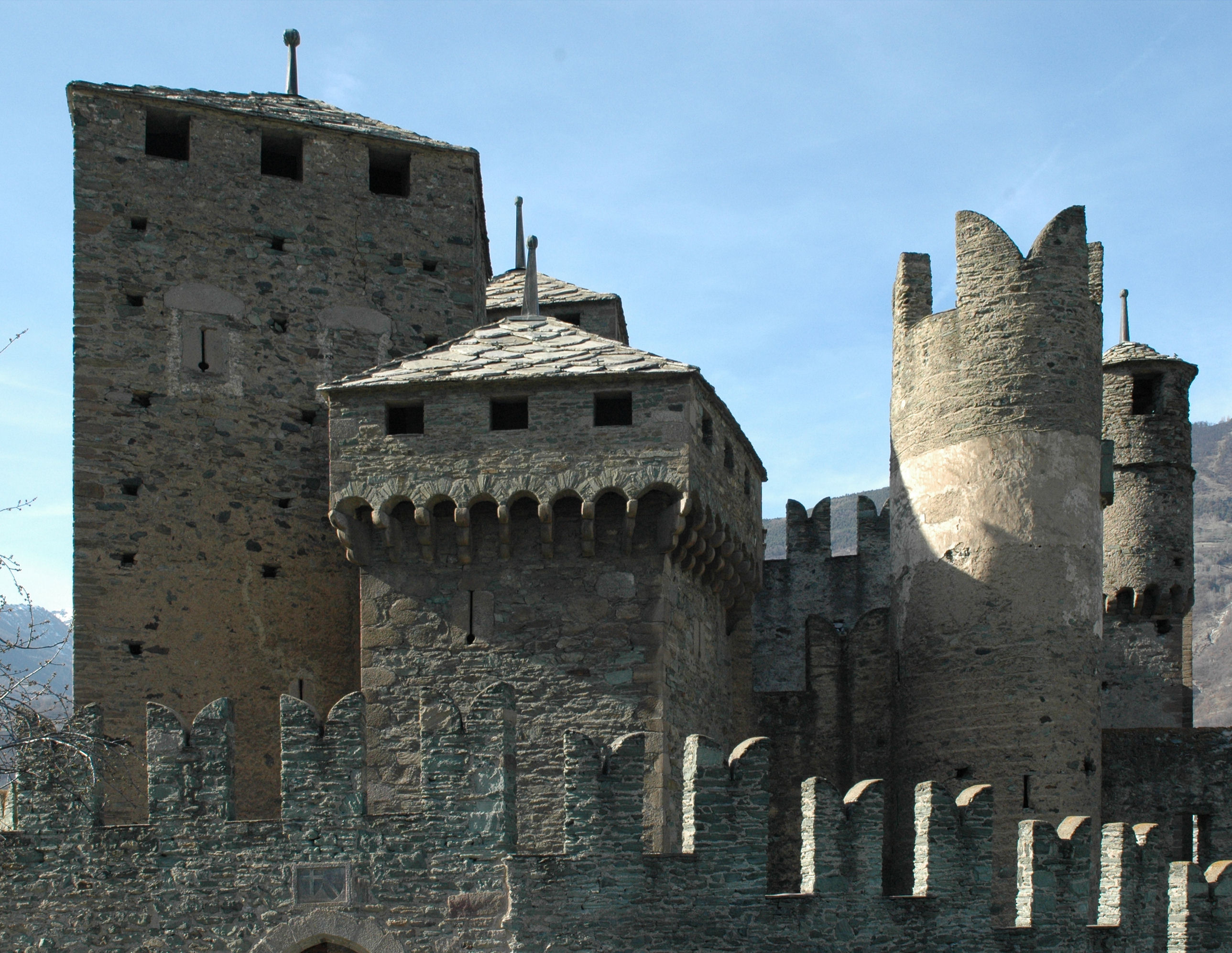 torri e merli ghibellini del castello medioevale di Fénis in Val d'Aosta (Italia).